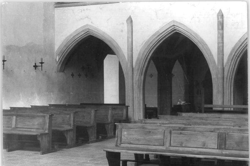 Erfurt, Ursulinen Kloster, Kirche, Mittelschiff Zentralbild TBD-21.7.52 Kirche des Ursuliner-Klosters in Erfurt. Am 21.7.52 wurde die 1944 durch amerikanische Bomben zerstörte und nach Kriegsende wieder aufgebaute Kirche des Ursuliner-Klosters neu eingeweiht. Seit Oktober 1948 läuft hier das Diözesan-Seminar für Seelsorgehilfe und Caritas. UBz: Blick in die Kirche.